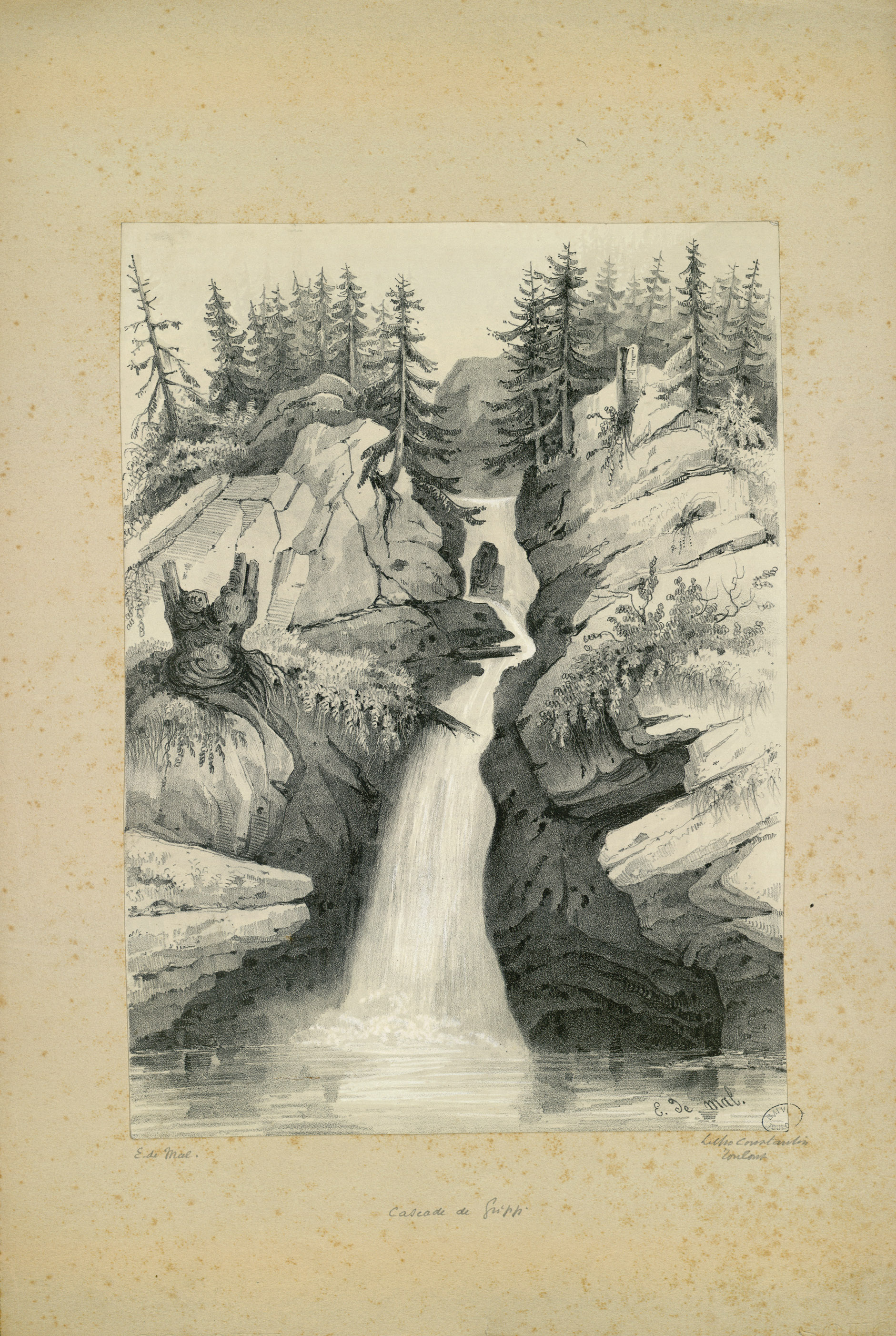 Fait partie d'un recueil de 23 planches lithographiées en camaïeu Ancely, René (1876 - 1966). Possesseur